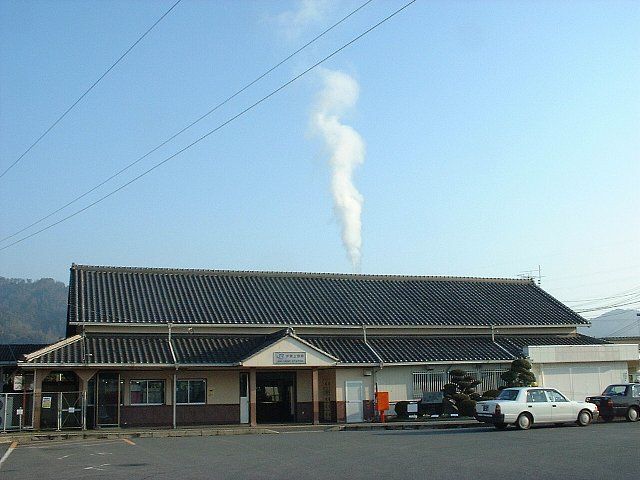 伊賀上野駅 駅舎